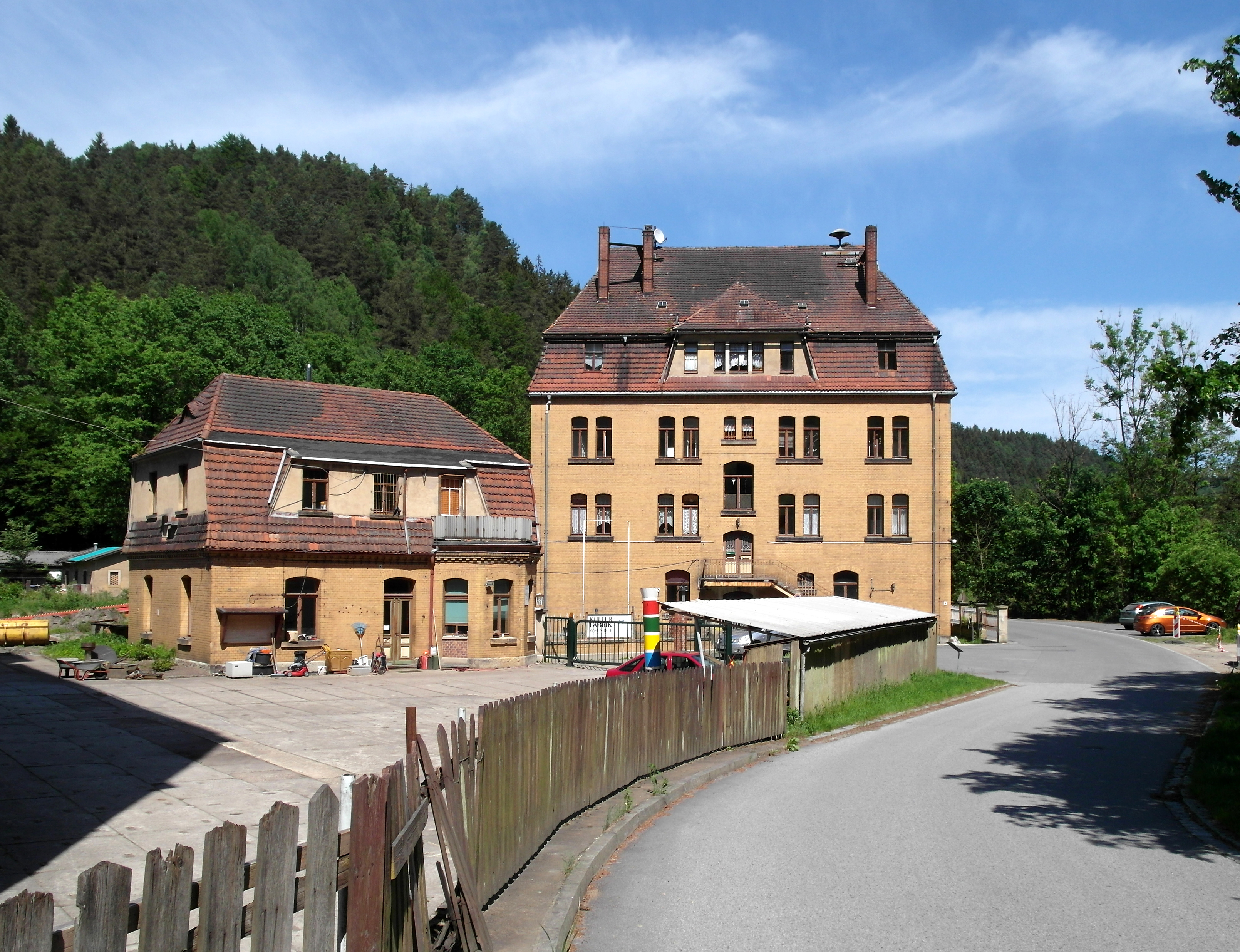 14.05.2018 01848 Kohlmühle (Hohnstein), Sebnitztalstraße 1: Der Standort der Kohlmühle hat eine jahrhundertealte Geschichte. Die heutige Werksanlage Kohlmühle (GMP: 50.940689,14.163807) entstand aus der 1902/03 erbauten Papiermühle der Fabrikantenfamilie Keffel, die in den 1930er Jahren zur Linoleumproduktion umgebaut und erweitert wurde. In den 1940er Jahren wurden hier Junkers-Flugzeugmotoren produziert. In der DDR-Zeit VEB Linoleumwerk Kohlmühle. Die nach der Wende privati- sierte Kohlmühle wurde wegen Insolvenz im Mai 2016 versteigert und verkauft. Hier links das Kontorgebäude (GMP: 50.940717,14.164870) und rechts Sebnitztalstraße 4 das Beamtenwohnhaus (GMP: 50.940766,14.165260). [SAM6213.JPG]20180514670DR.JPG(c)Blobelt